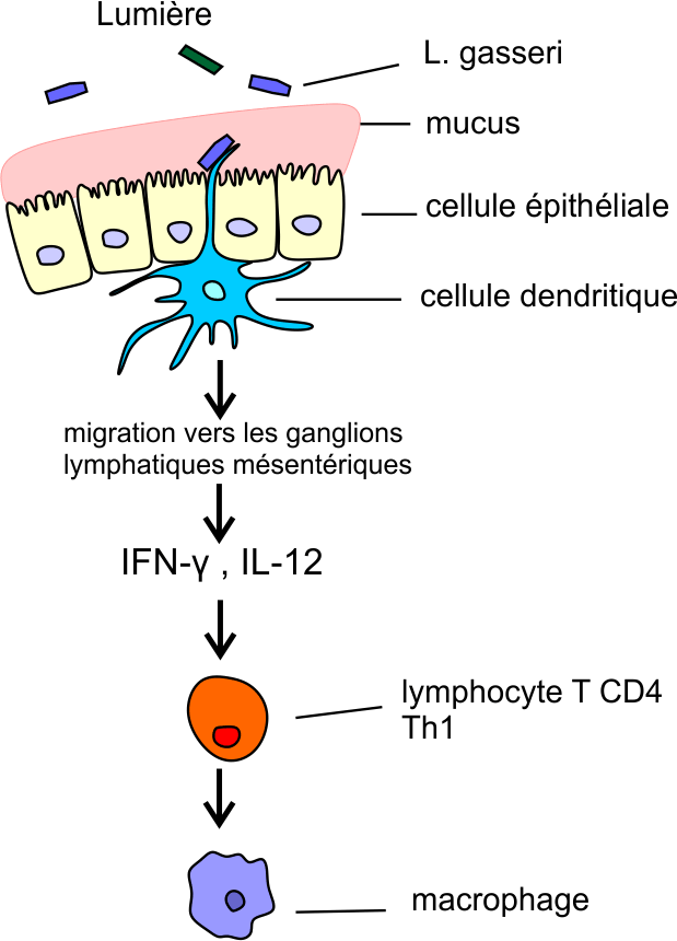 Lactobacillus gasseri dans la lumière de l'intestin, interagit avec une cellule dendritique qui sécrète des cytokines activant lymphocyte T et macrophage (simplification de Selle & Klaenhammer, 2013)